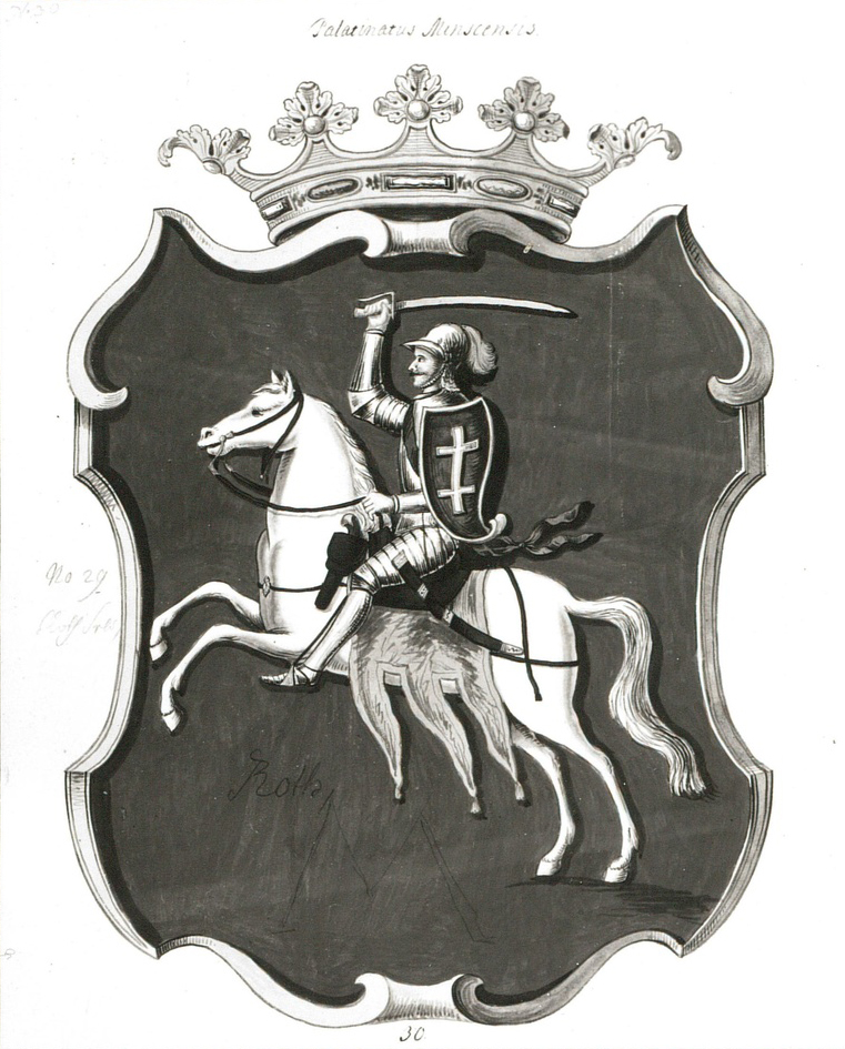 Беларуская (тарашкевіца): Герб Менскага ваяводзтва (Miensk) з Пагоняй (Pahonia)